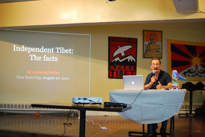 Photo: Sonam Topgyal